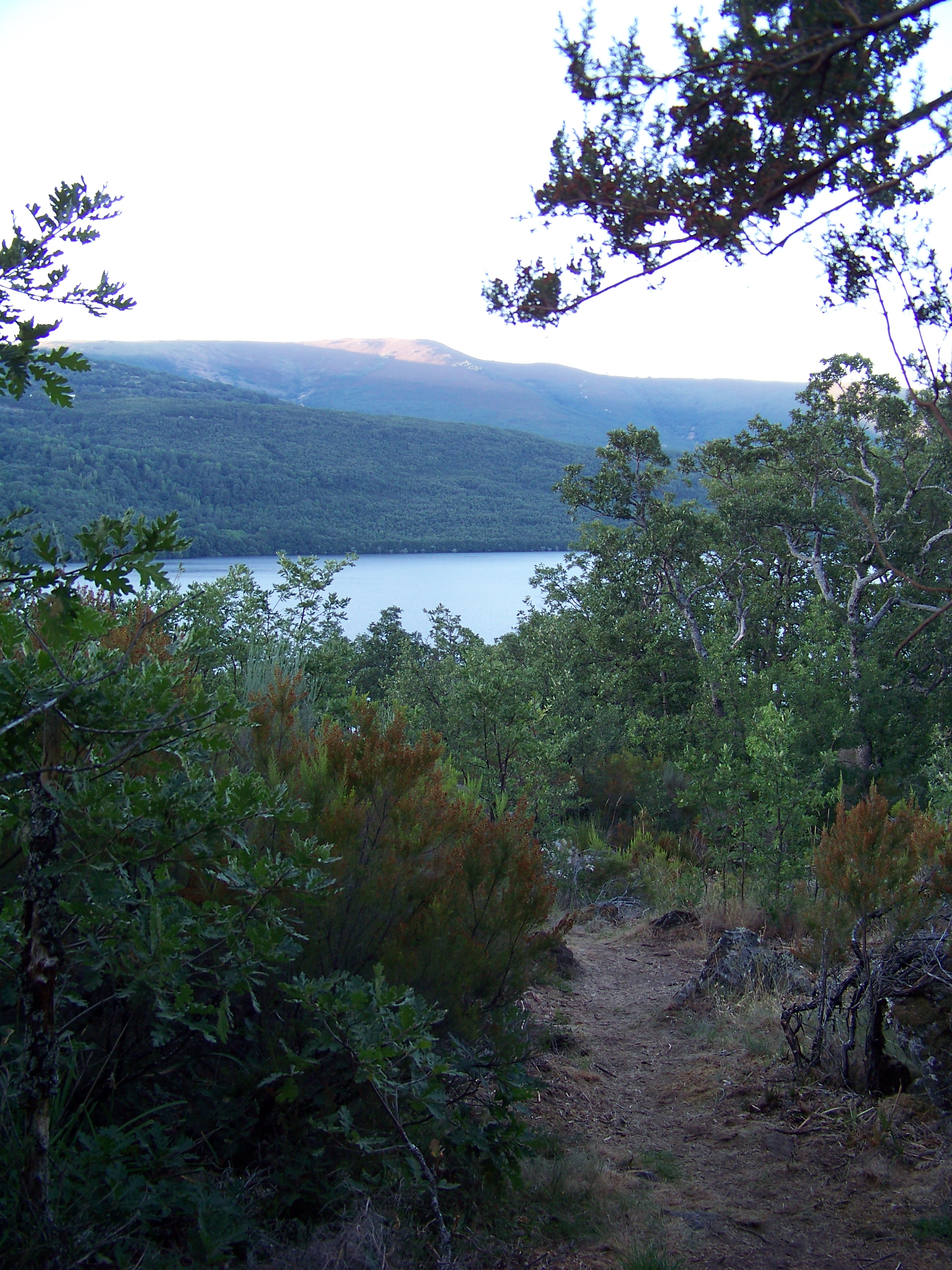 Lago de Sanabria y alrededores This is a photography of a Special Area of Conservation in Spain with the ID: ES4190105. Natura2000 entry, EEA entry